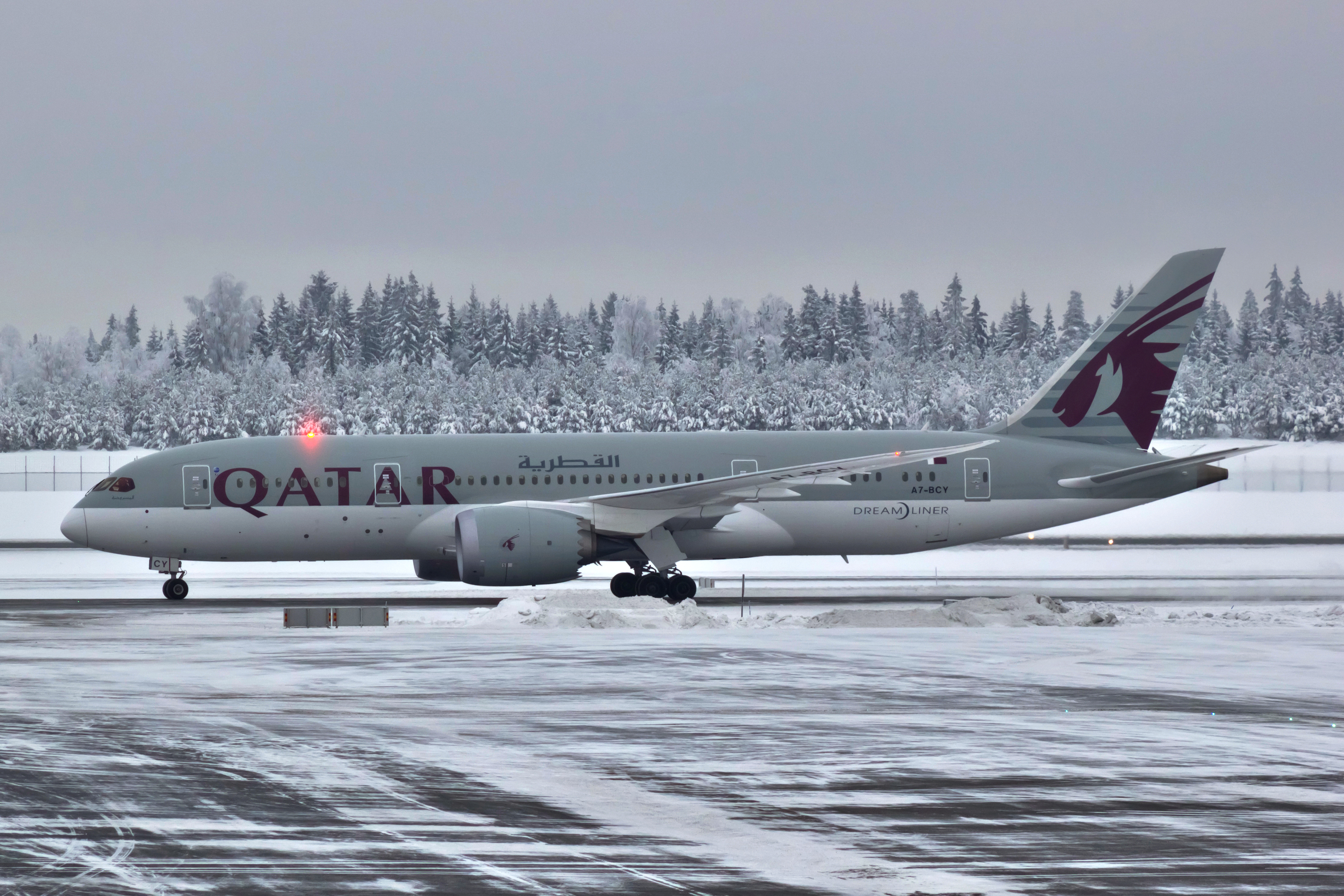 Boeing 787 de Qatar no aeroporto de Oslo-Gardermoen.